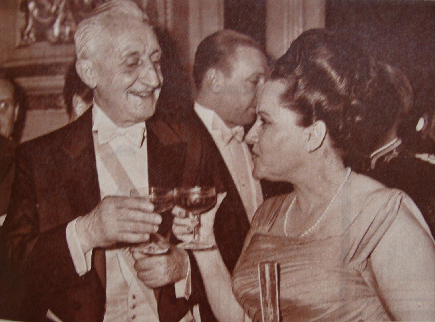 El Presidente Arturo Illia brinda con su esposa, Silvia Martorell, durante su ceremonia de asunción.